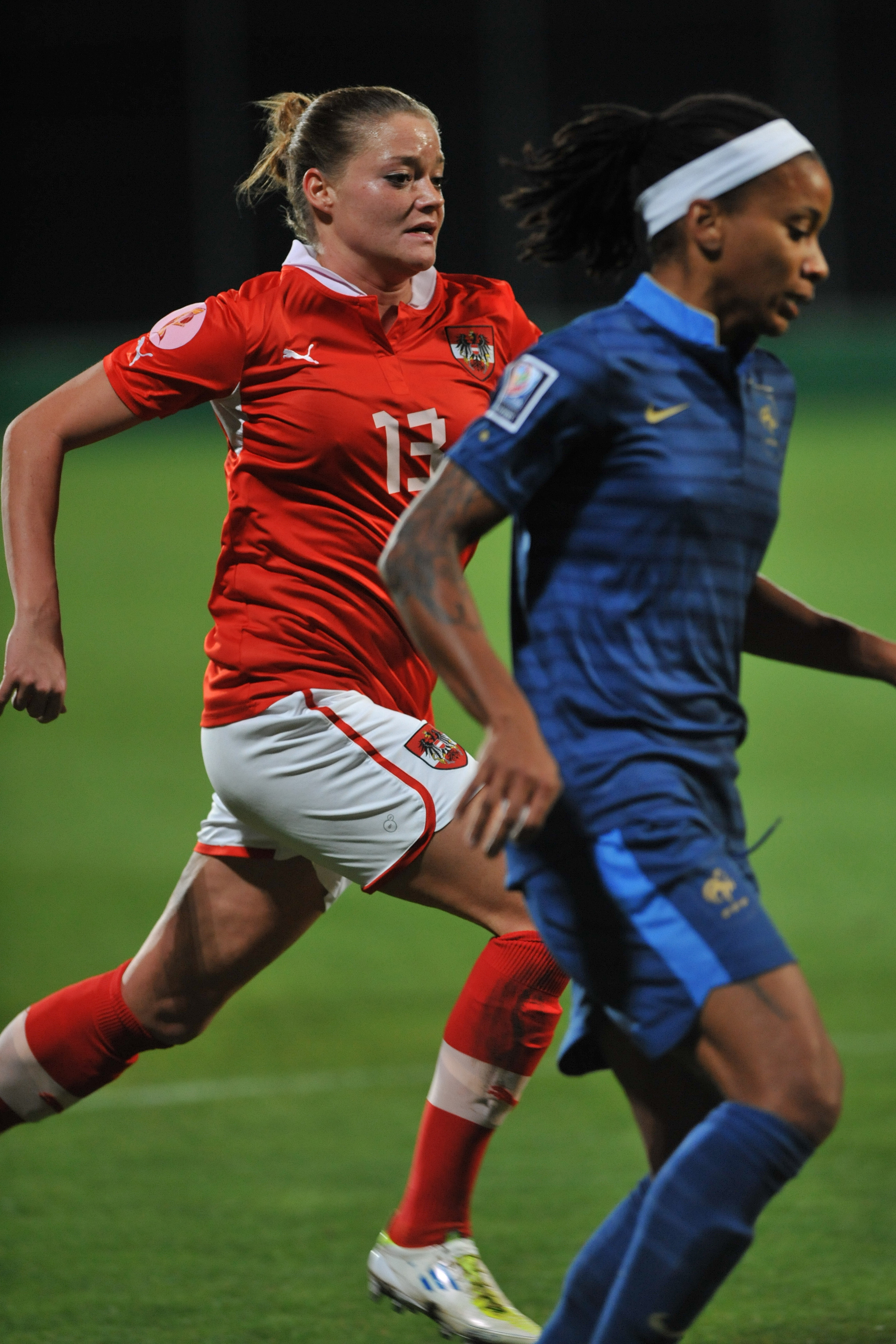 FIFA Women's World Cup 2015 Qualiying Round Österreich - Frankreich am 31. Oktober 2013 in Ritzing: Verena Aschauer